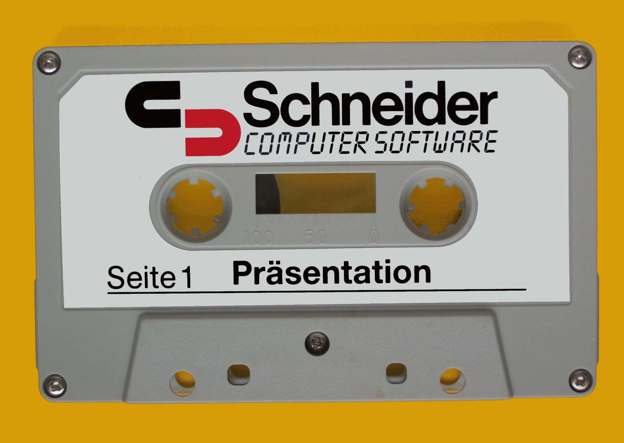 Präsentationprogramme auf Daten Compact Cassette für Schneider CPC